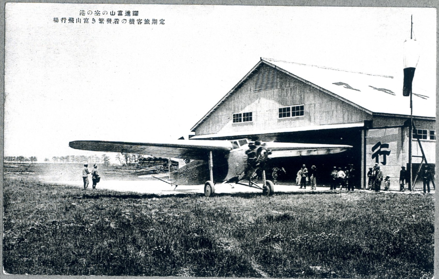 富山飛行場絵葉書